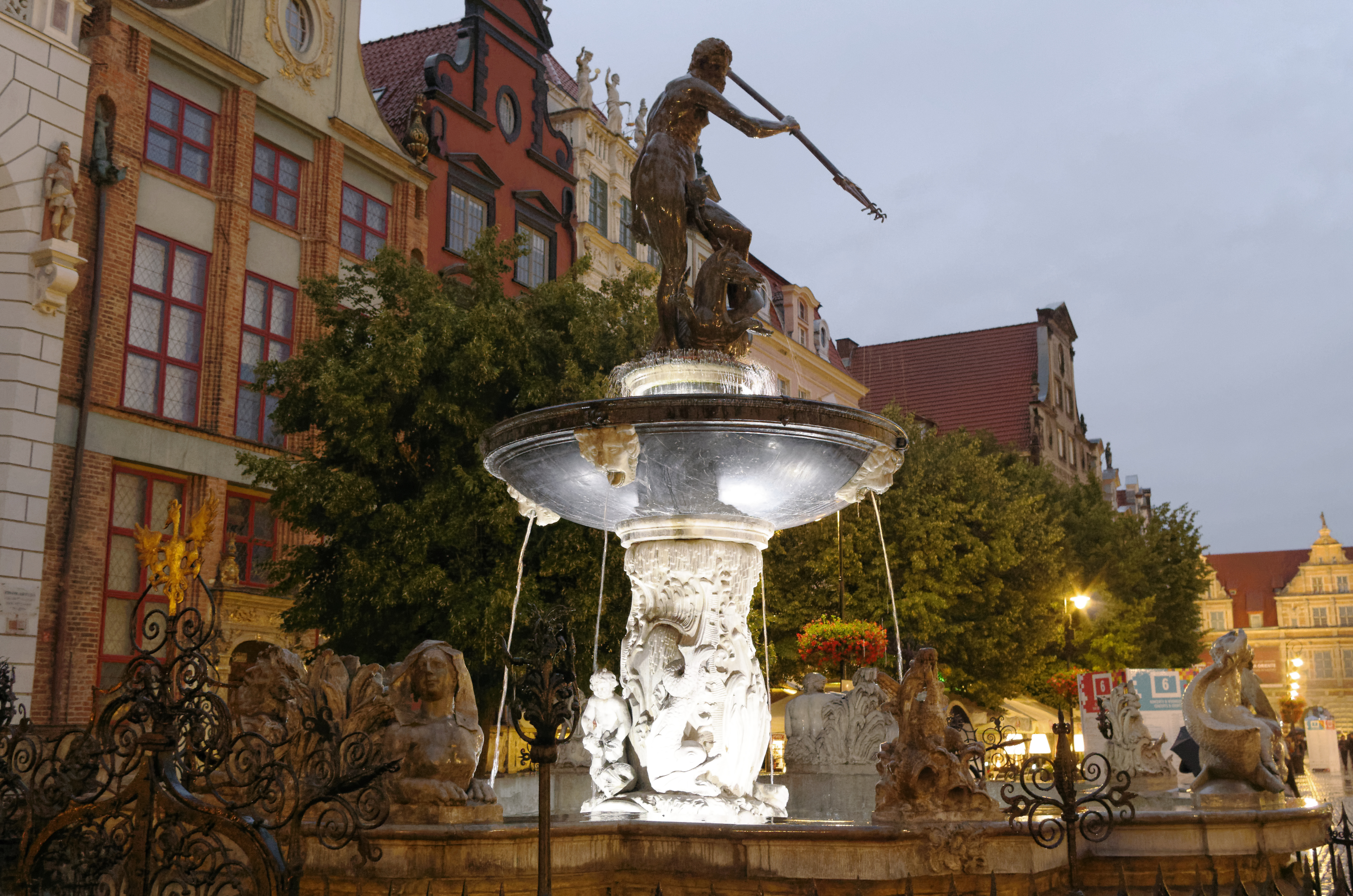 Gdańsk, fontanna Neptuna, 1606-1633